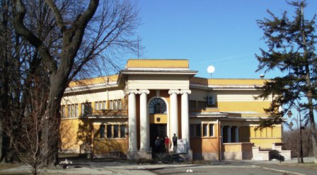 Фотографија Галерије УЛУС-а „Цвијета Зузорић“ у Београду Мали Калемегдан, Аутор: Nicolo